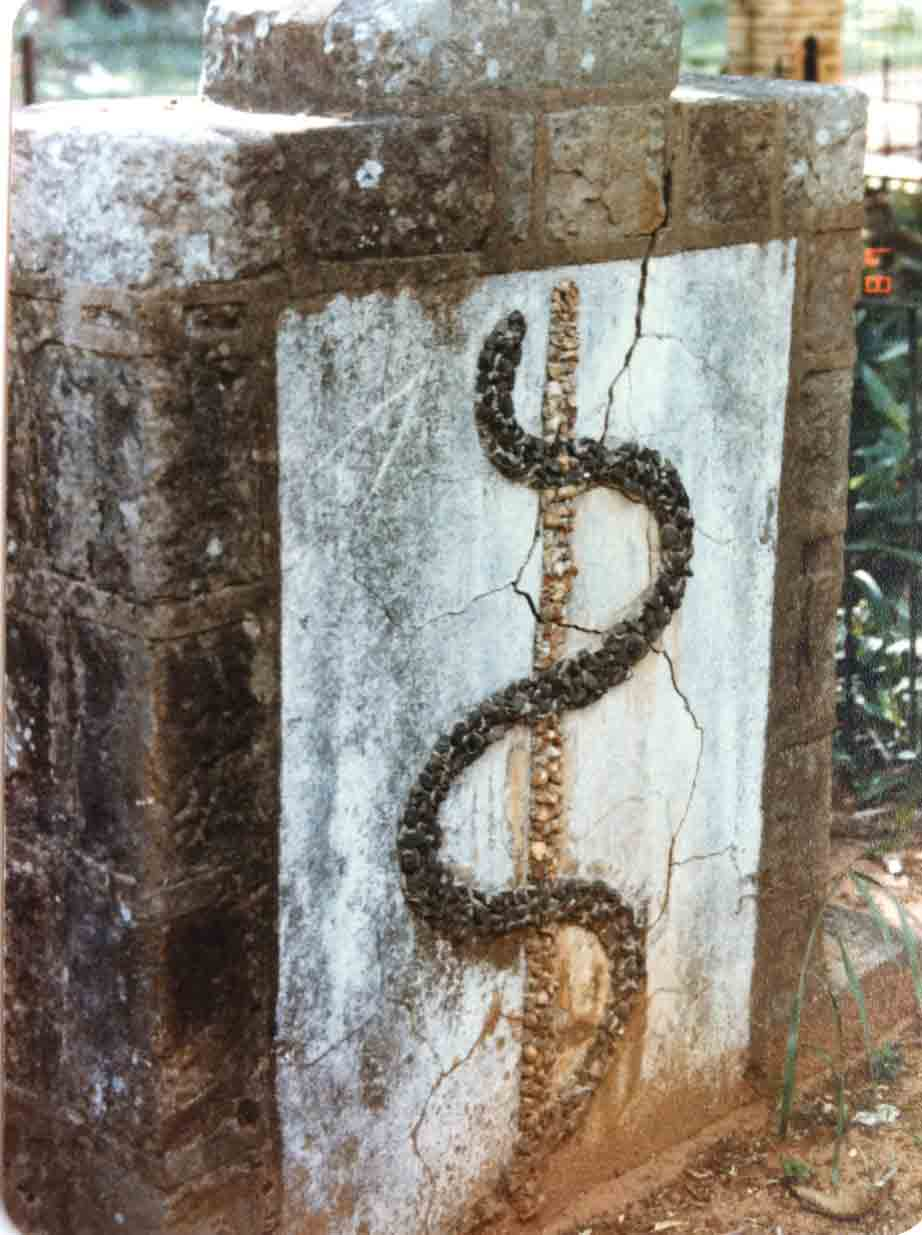 Emil Hassler. Sepultura en el cementerio de San Bernardino, Dep. Cordillera, Paraguay